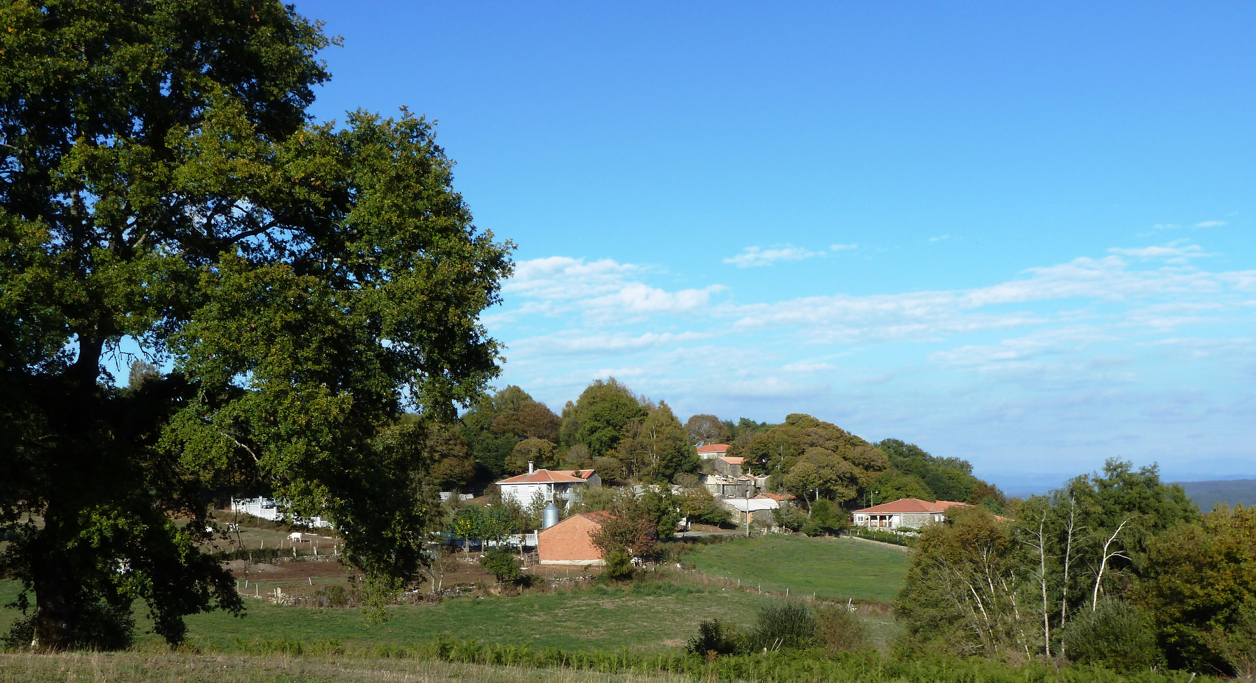 Revelle, Santa Cristina, Carballedo